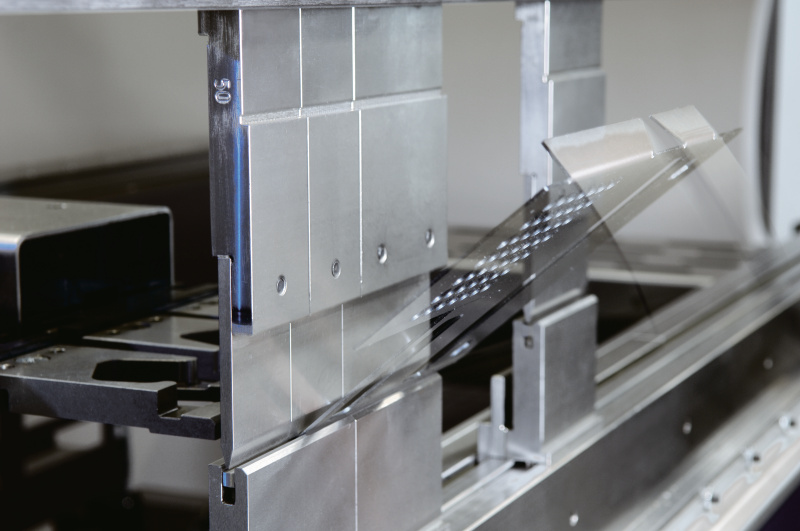 Bystronic Biegen